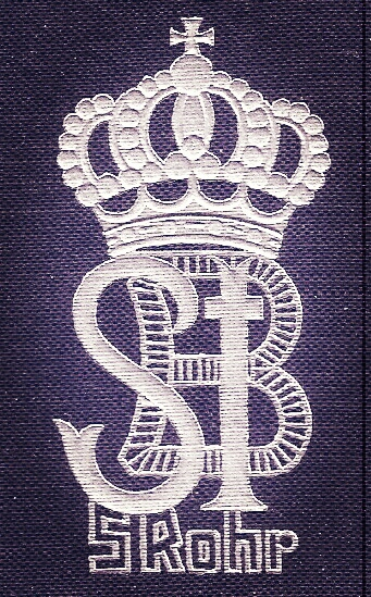 Signum des Sturm-Bataillons Nr. 5 (Rohr)